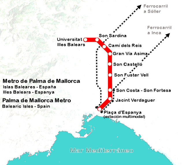 Mapa del Metro de Palma de Mallorca Palma de Mallorca subway map